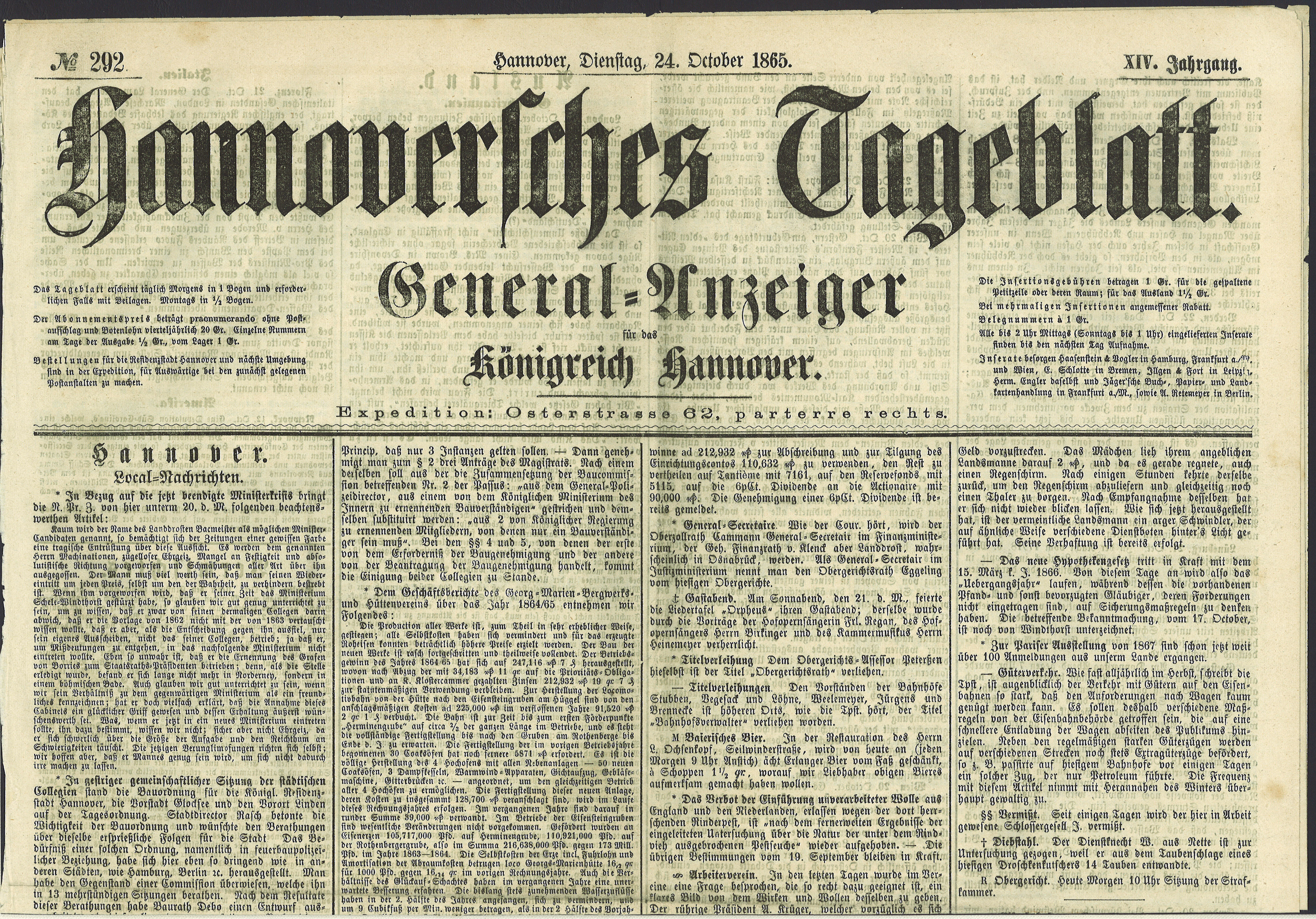 Hannoversches Tageblatt. General-Anzeiger für das Königreich Hannover. Expedition: Osterstrasse 62, parterre rechts. XIV. Jahrgang, No. 292, Dienstag, 24. Oktober 1865 Tageblatt im Format ca. DIN A2 (aufgeschlagen ca. DIN A1), hier: oberer Teil der Titelseite der Nummer